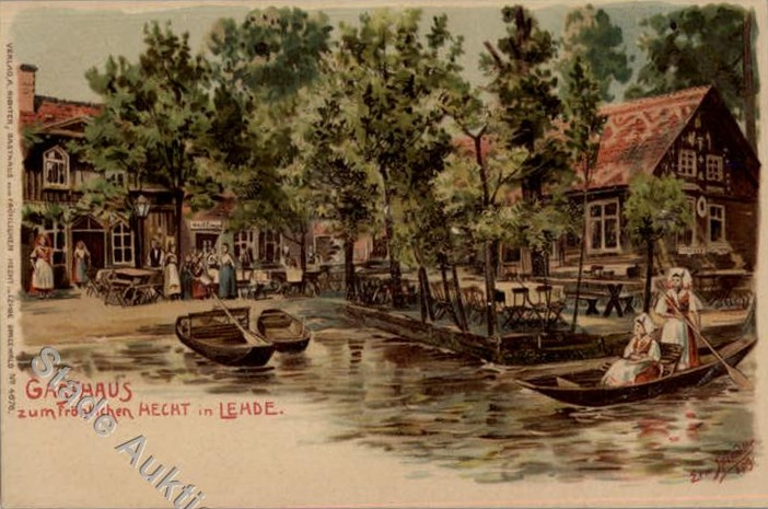 Postkarte: "Gasthaus zum fröhlichen Hecht in Lehde." Verlag A. Richter, Gasthaus zum fröhlichen Hecht in Lehde, Spreewald